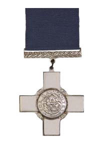 צלב ג'ורג'